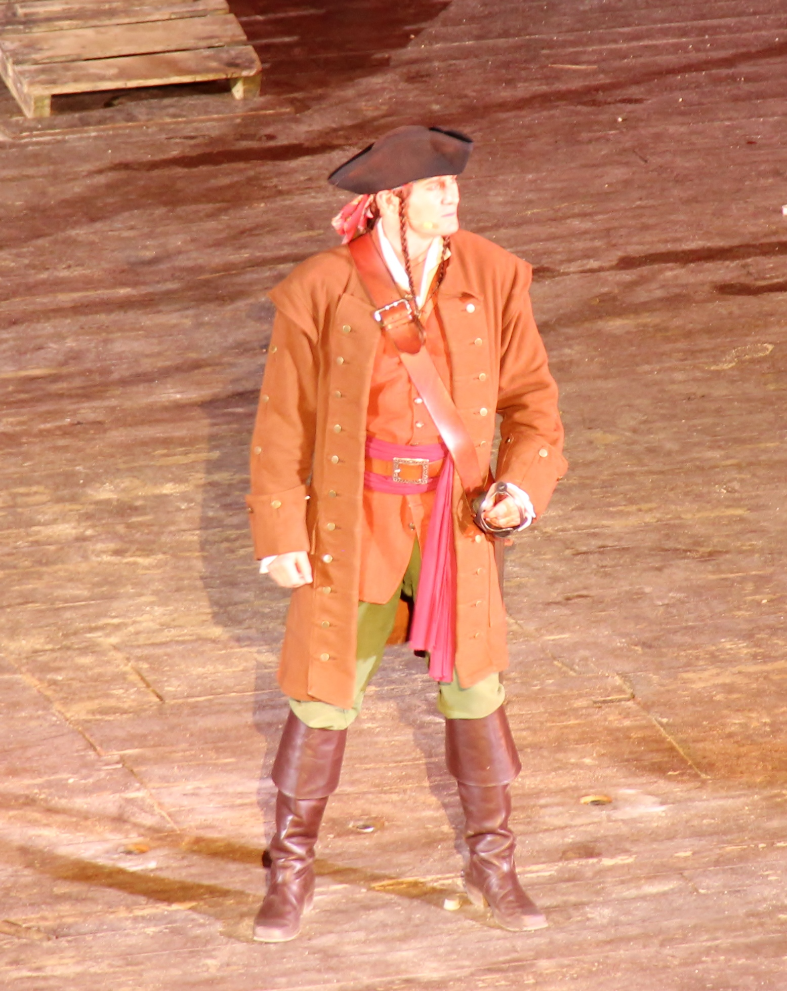 Frode Winther as Langemann, 2016